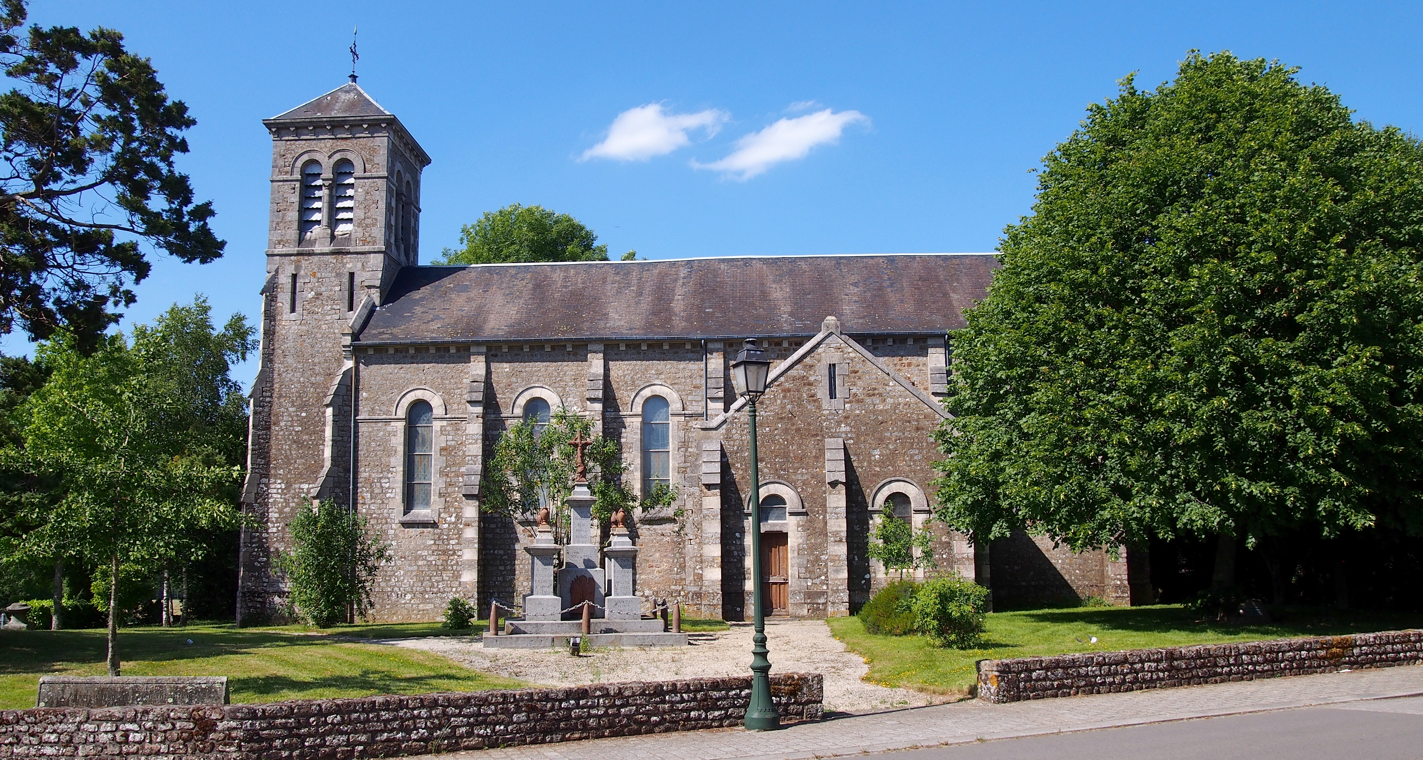 Durcet (Normandie, France). L'église Notre-Dame.